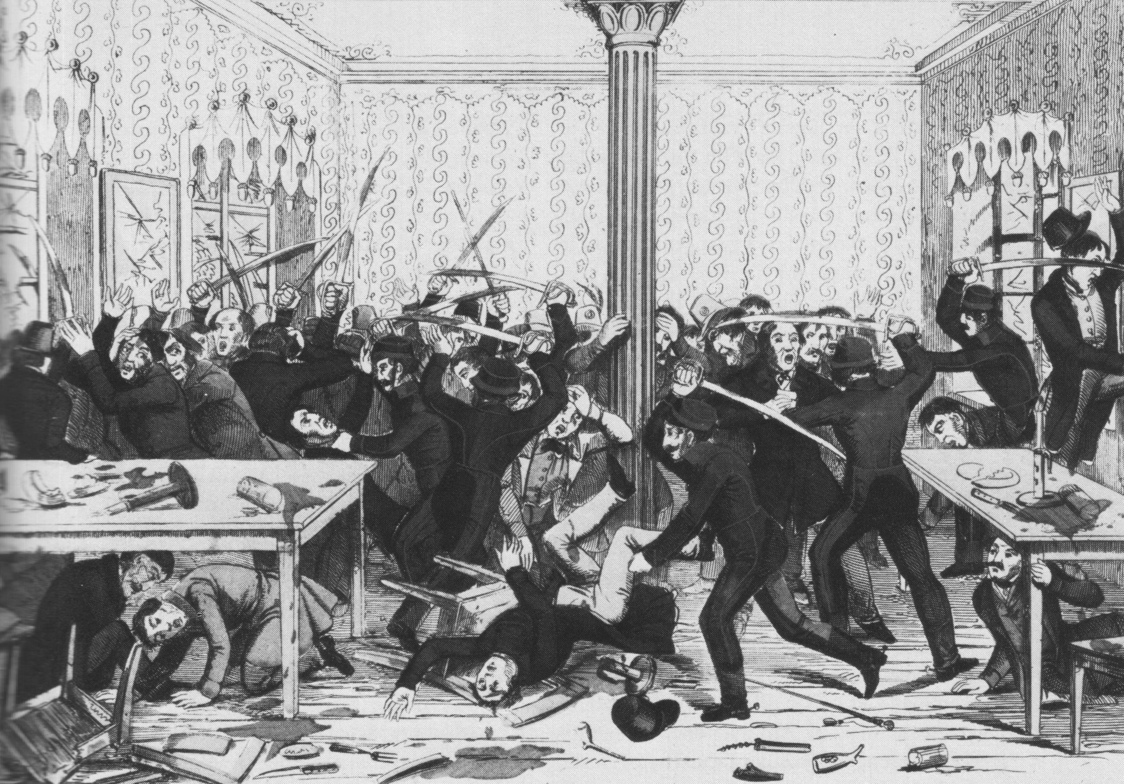 27. Juni 1848. Schifferling. Ulm. Versuch Demokratenverein